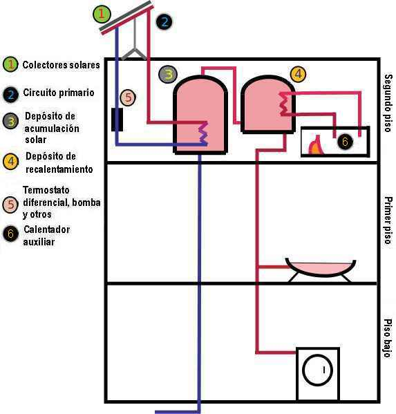 Modificación del que tiene el mismo nombre y traducción de leyenda